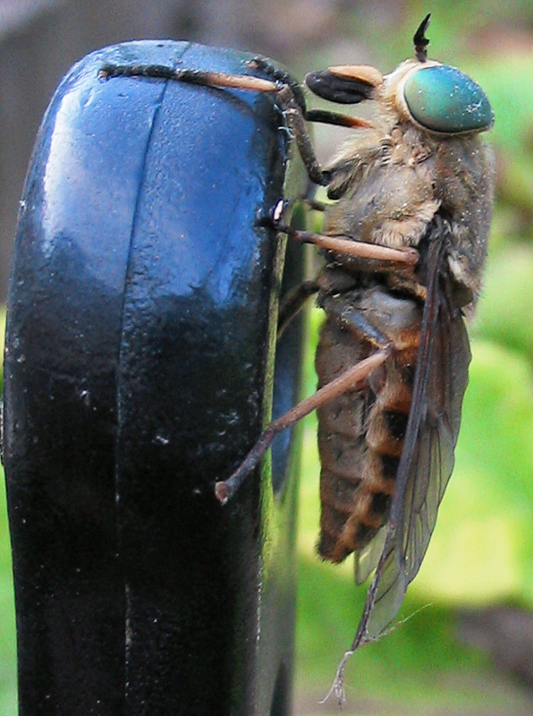 Beschreibung: Gemeine Viehbremse (Tabanus_bromius) Fotograf: Darkone, 2. Juli 2005